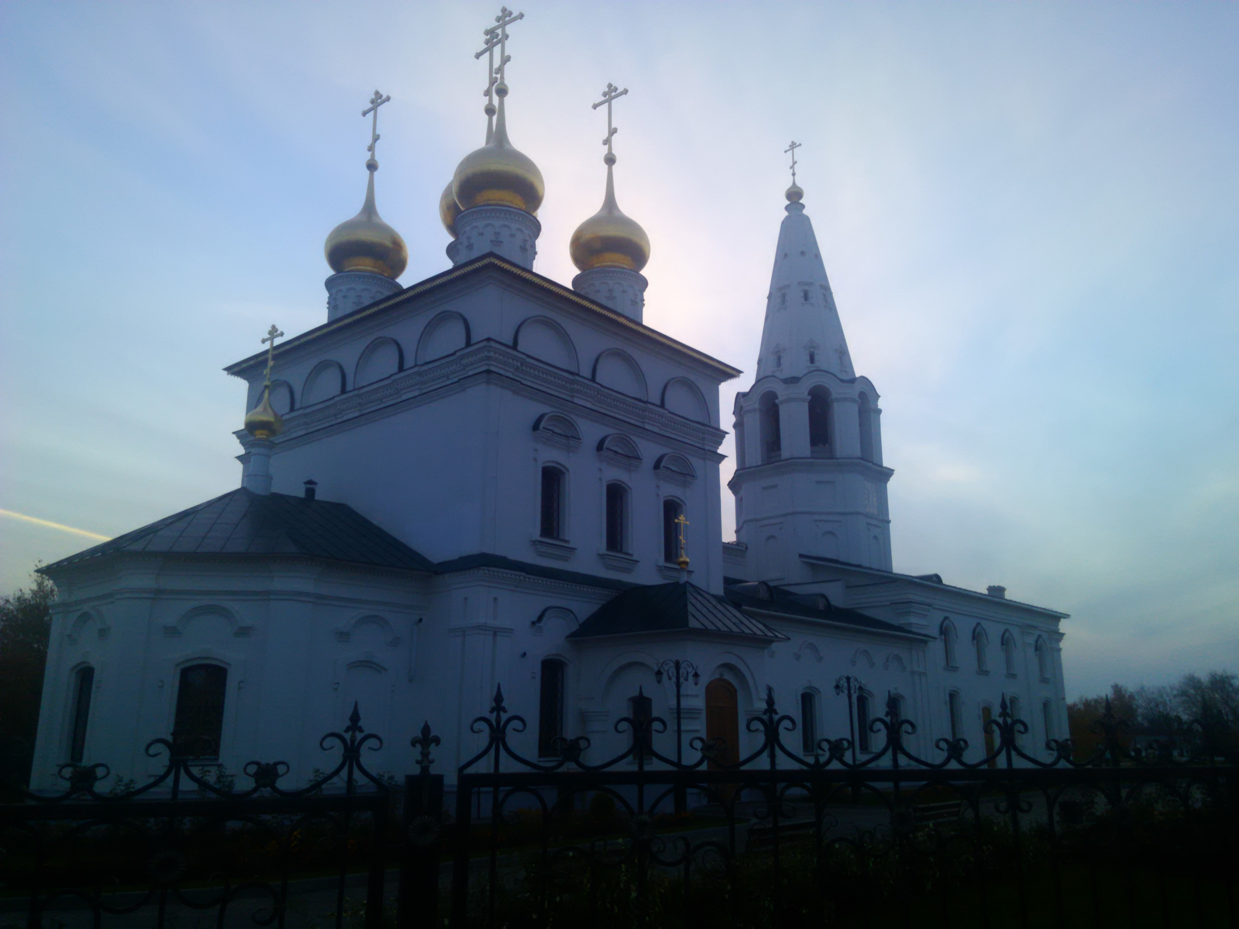 Церковь иконы Божией Матери «Знамение» (Нижегородская область, Бор, улица Ленина / улица Луначарского)